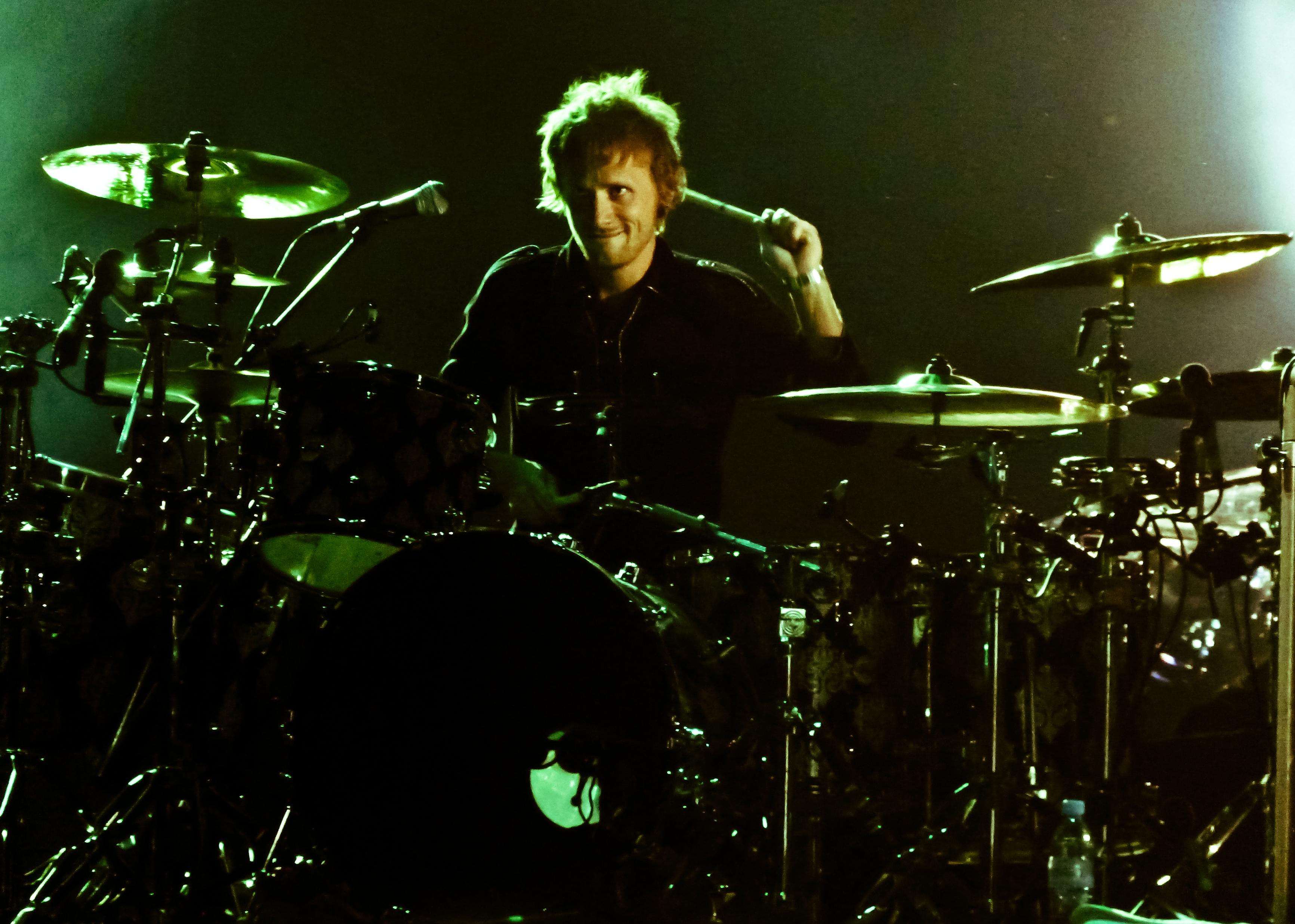 Dominic Howard tijdens een optreden in het Estadio Ciudad de La Plata op 11 maart 2011.